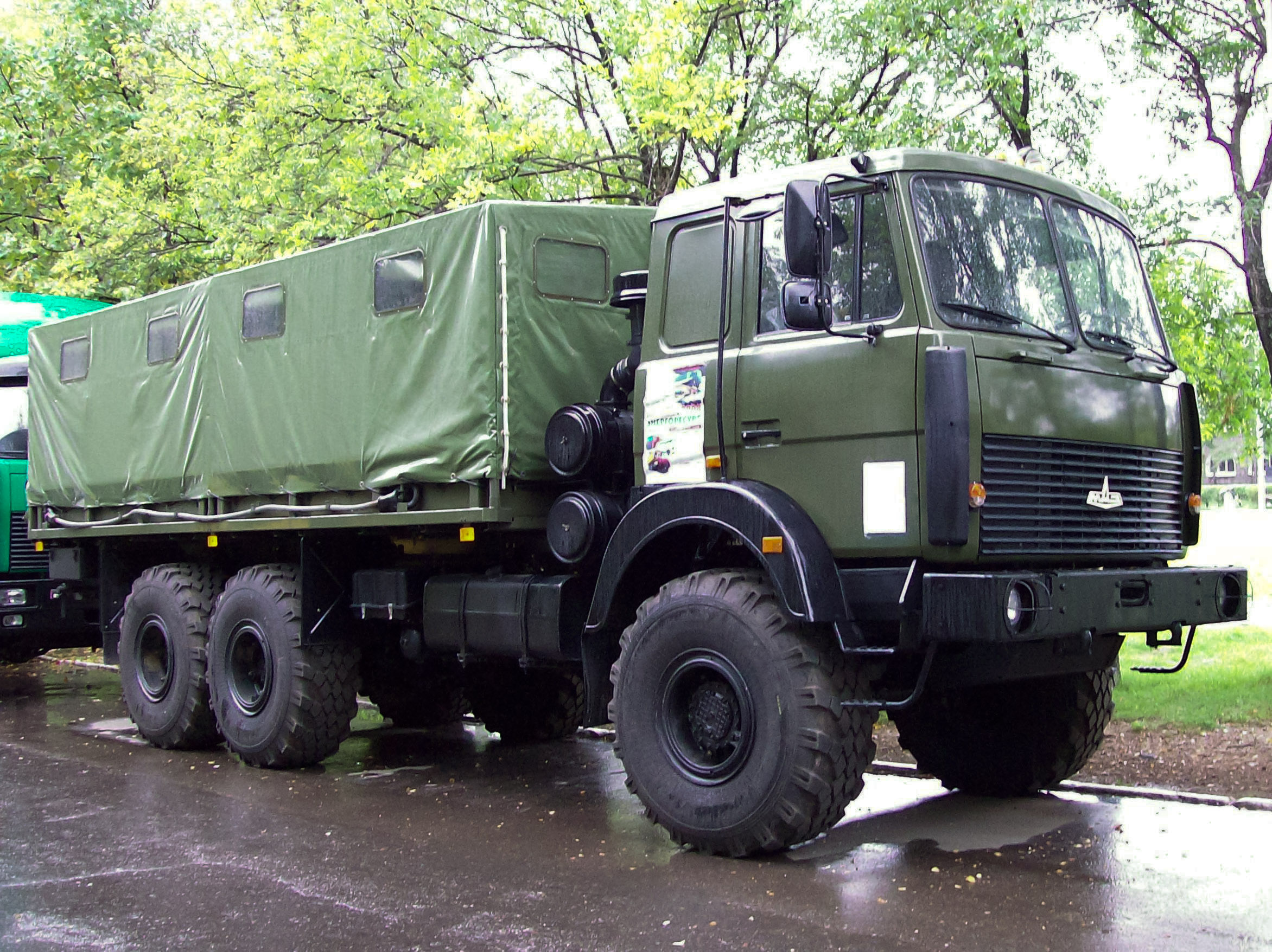 МАЗ-6317